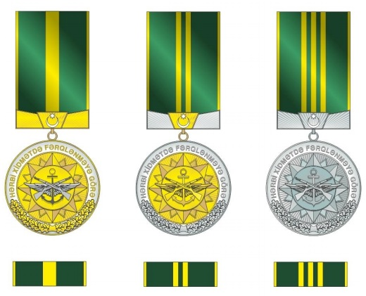 Medalla de distinción en el Servicio Militar (Azerbaiyán)